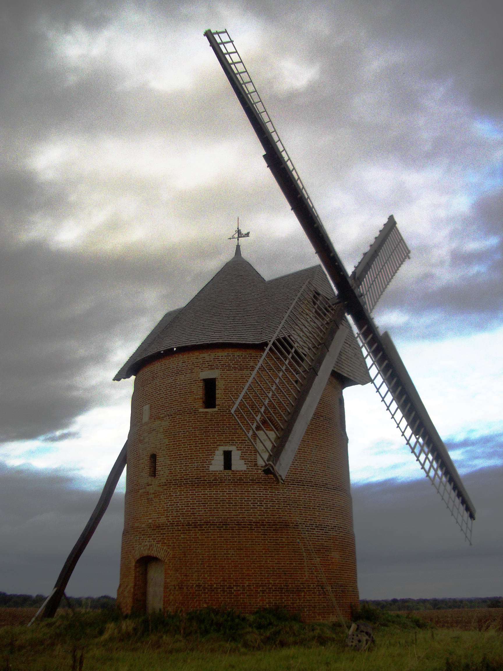 Le moulin de Frucourt est un ancien moulin fortifié à toit tournant.